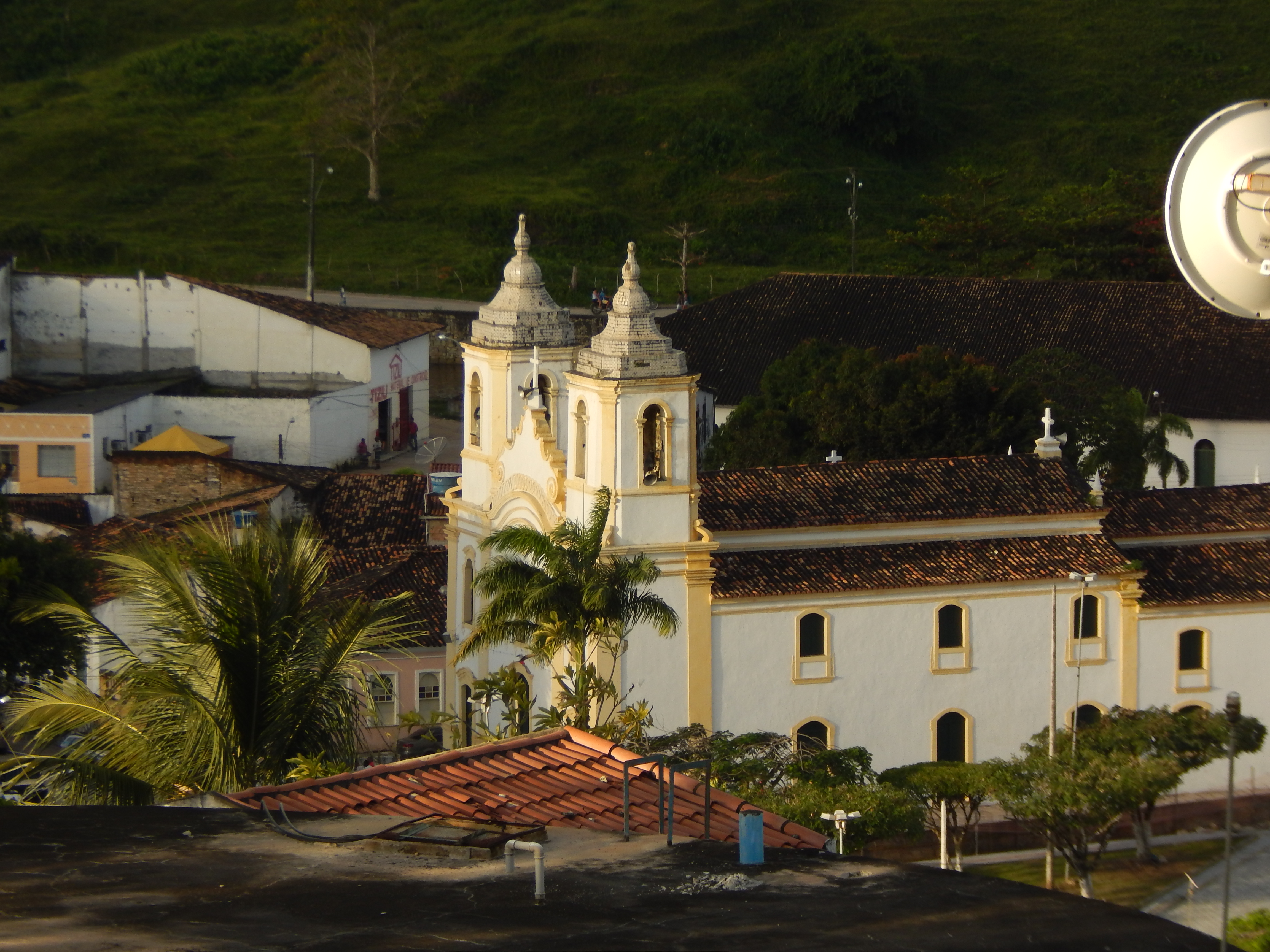 Igreja Matriz do Coração de Jesus